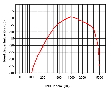 Curva de compensación sofométrica. Esta curva ha sido dibujada por PACO Categoría:Electrónica (imagen)